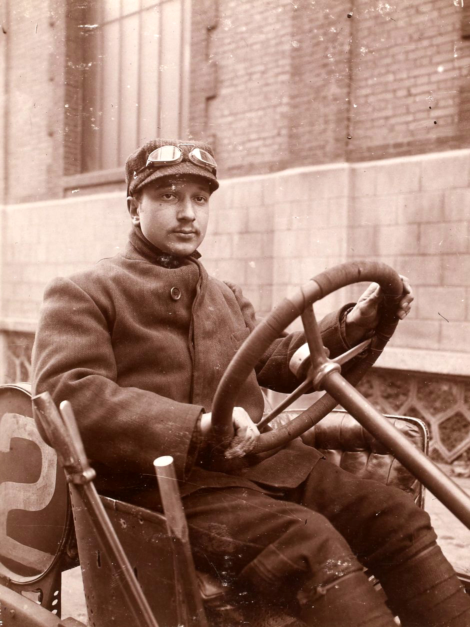 Albert Clément, pilote automobile français (1883-1907)